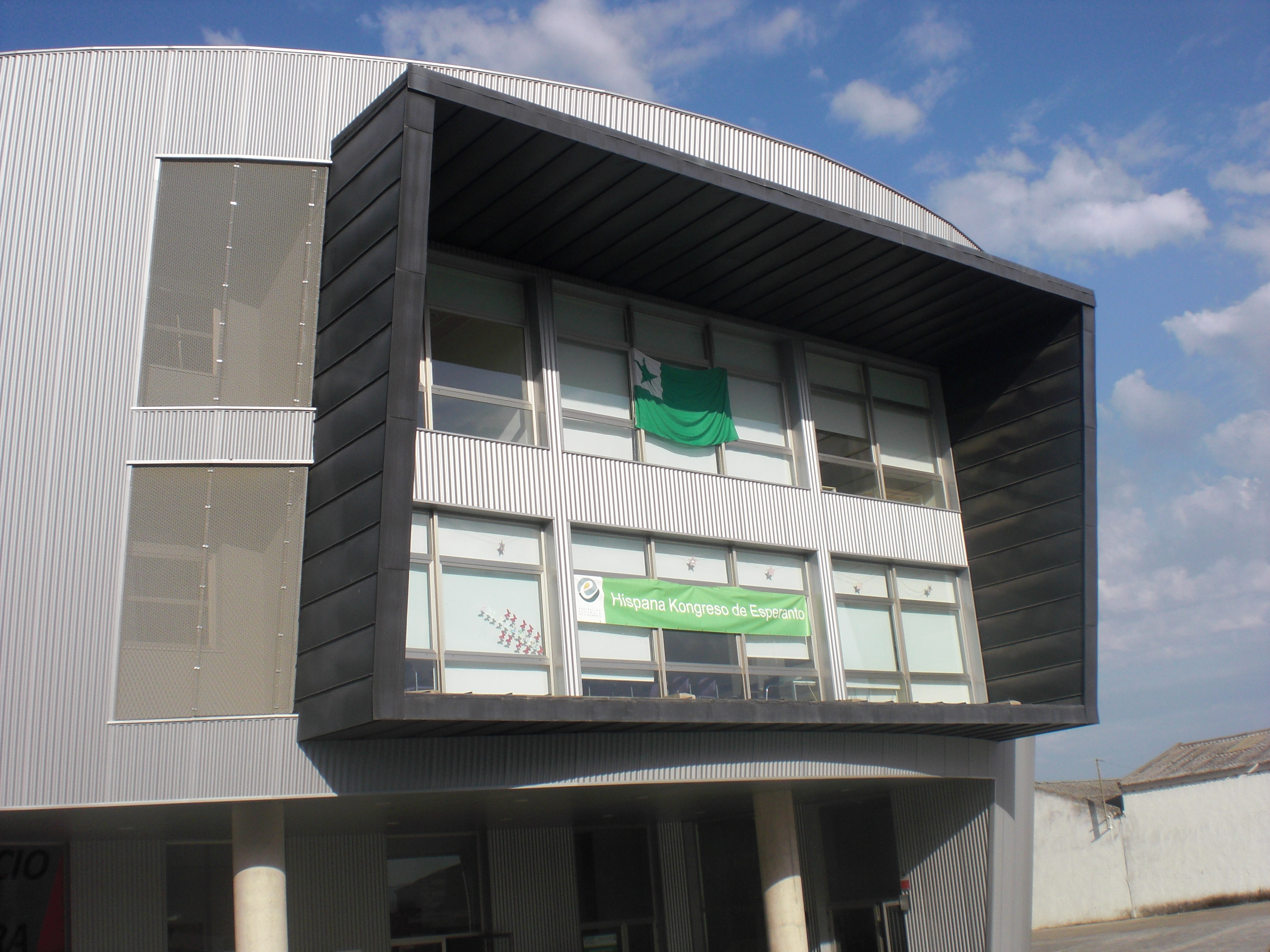 kongresejo de Herrera